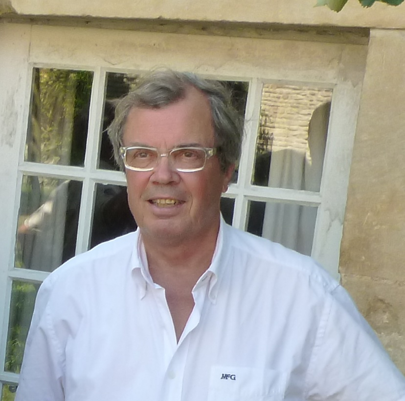 Alain Tourret à Moult en août 2013